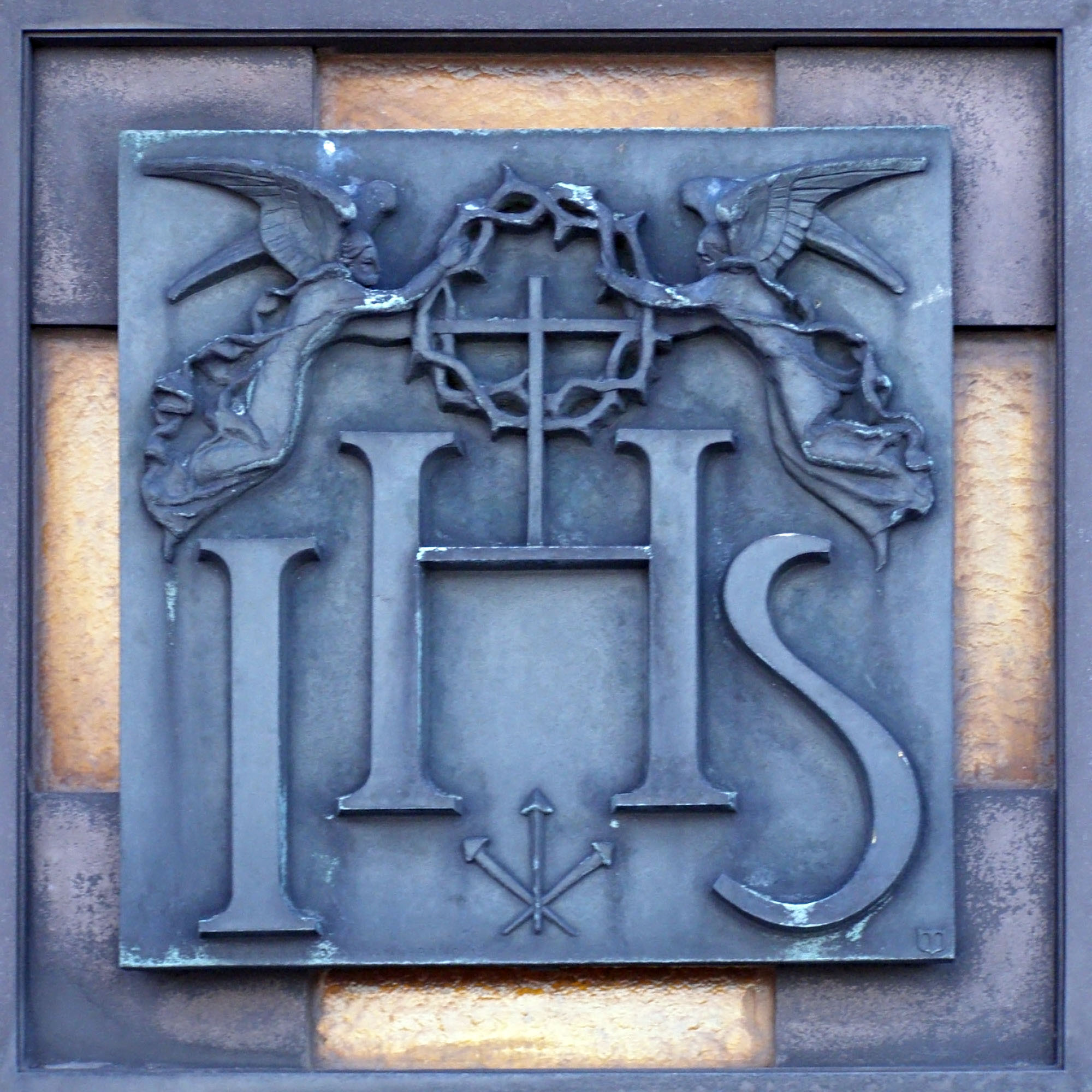 Hostýn, Bazilika Nanebevzetí Panny Marie, detail vstupních dveří: IHS